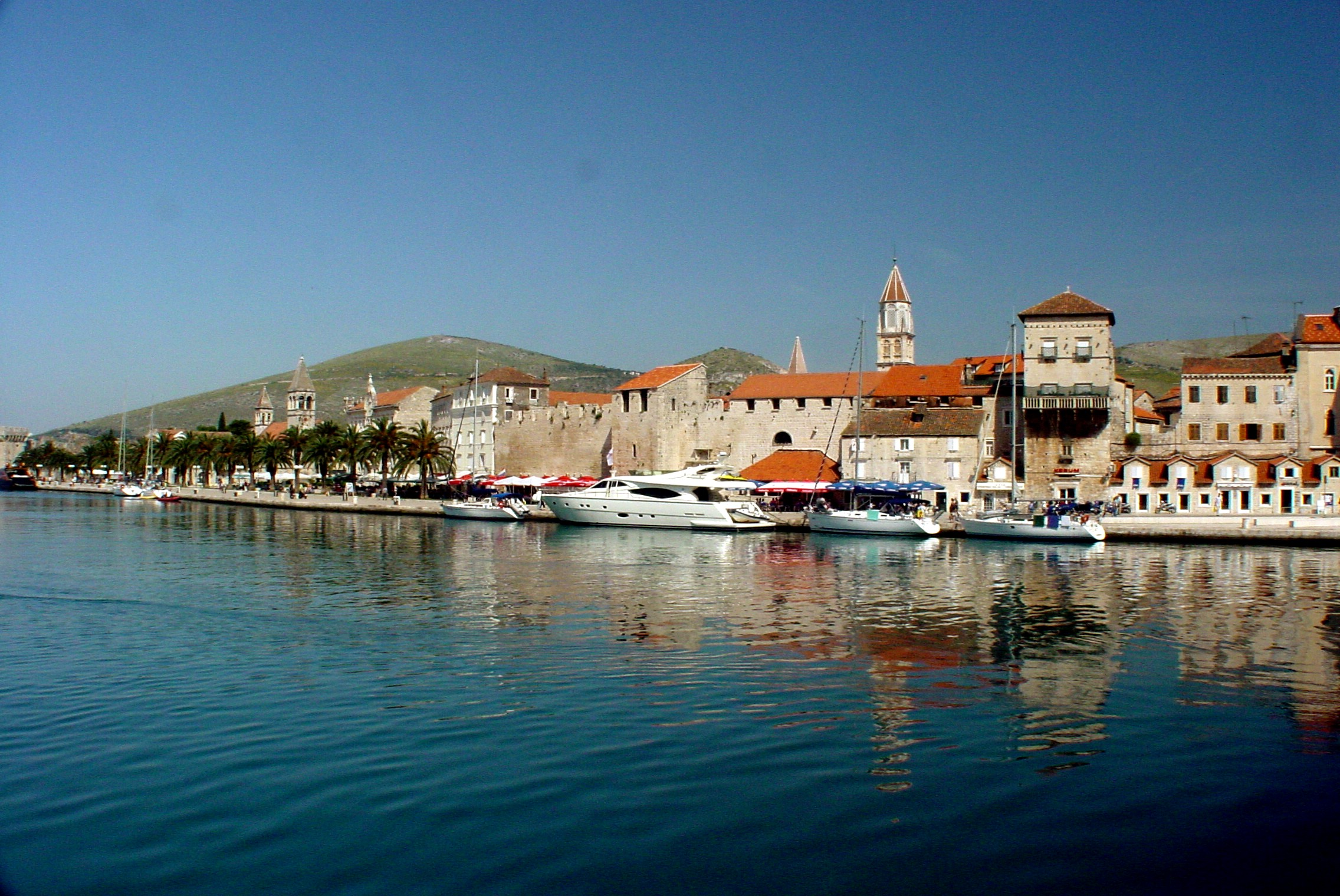 Trogir Kroatien